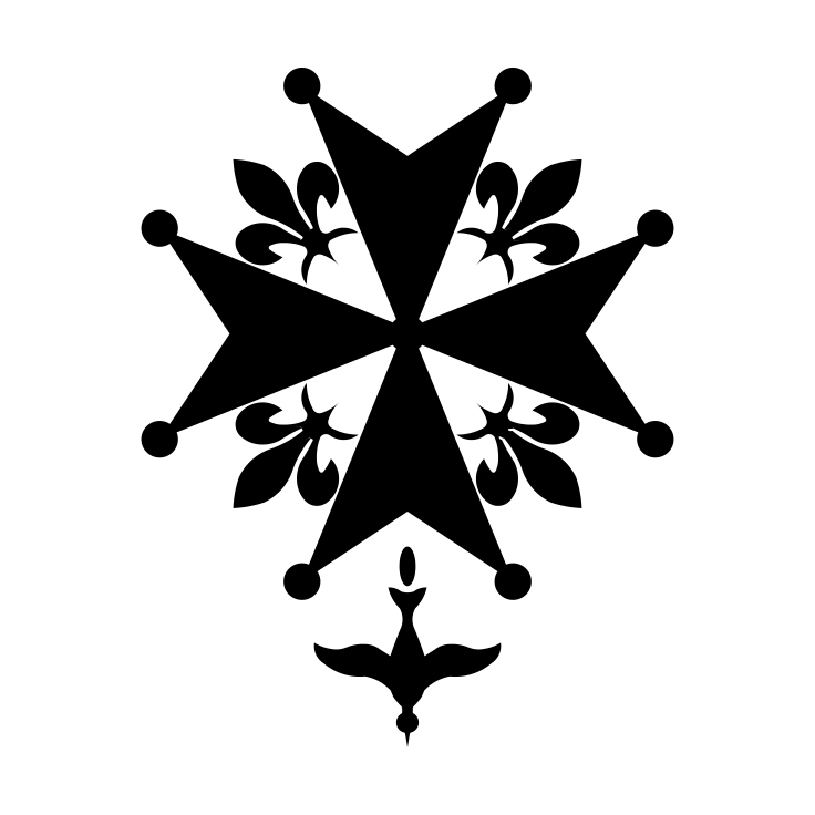 Símbolos